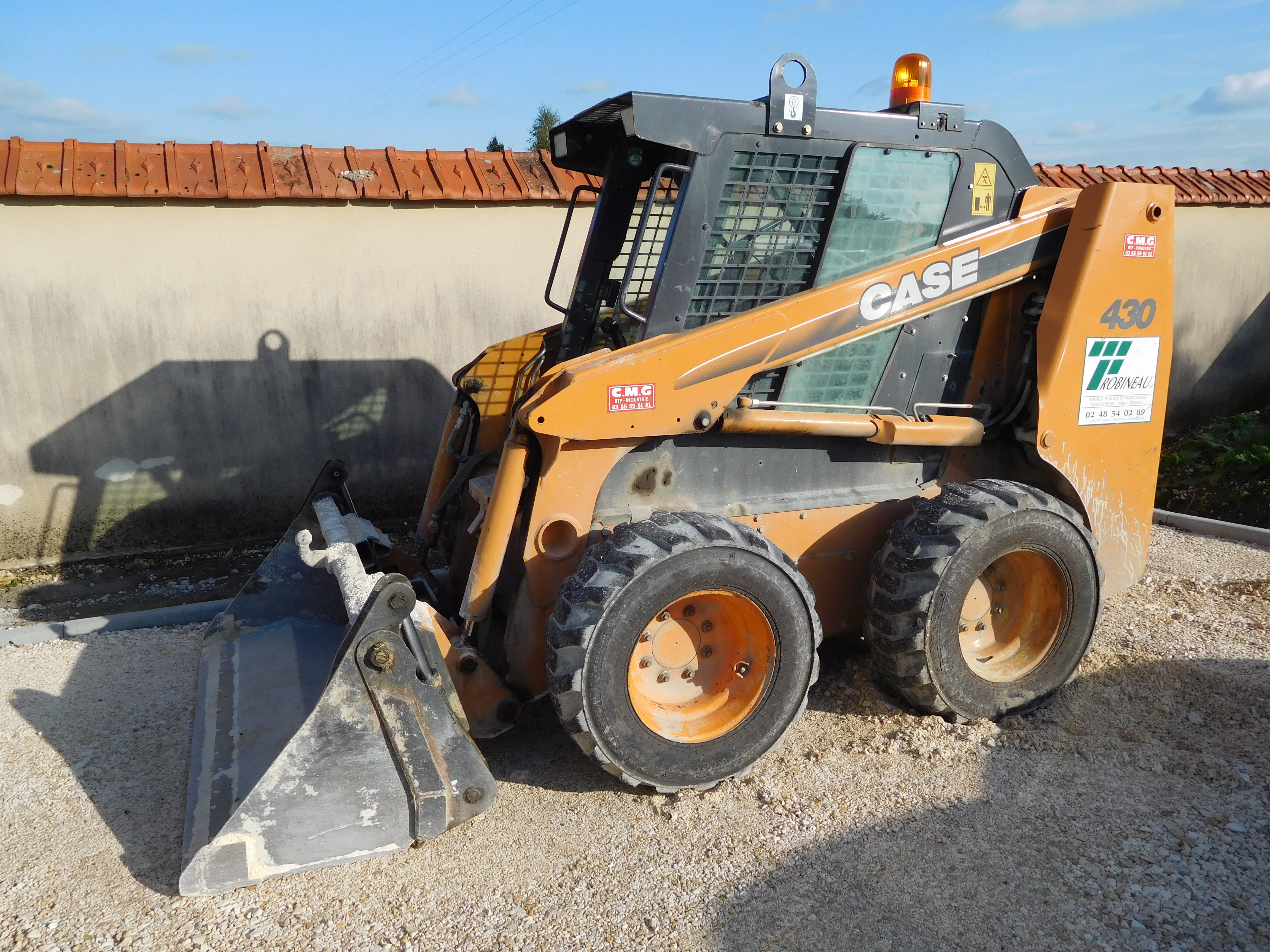 Chargeur sur pneus compact Case 430.